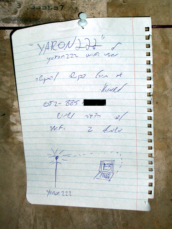 מודעה שנתלתה מתחת לבית שלי. אין לי שום קשר לזה מעבר לכך, אגב.